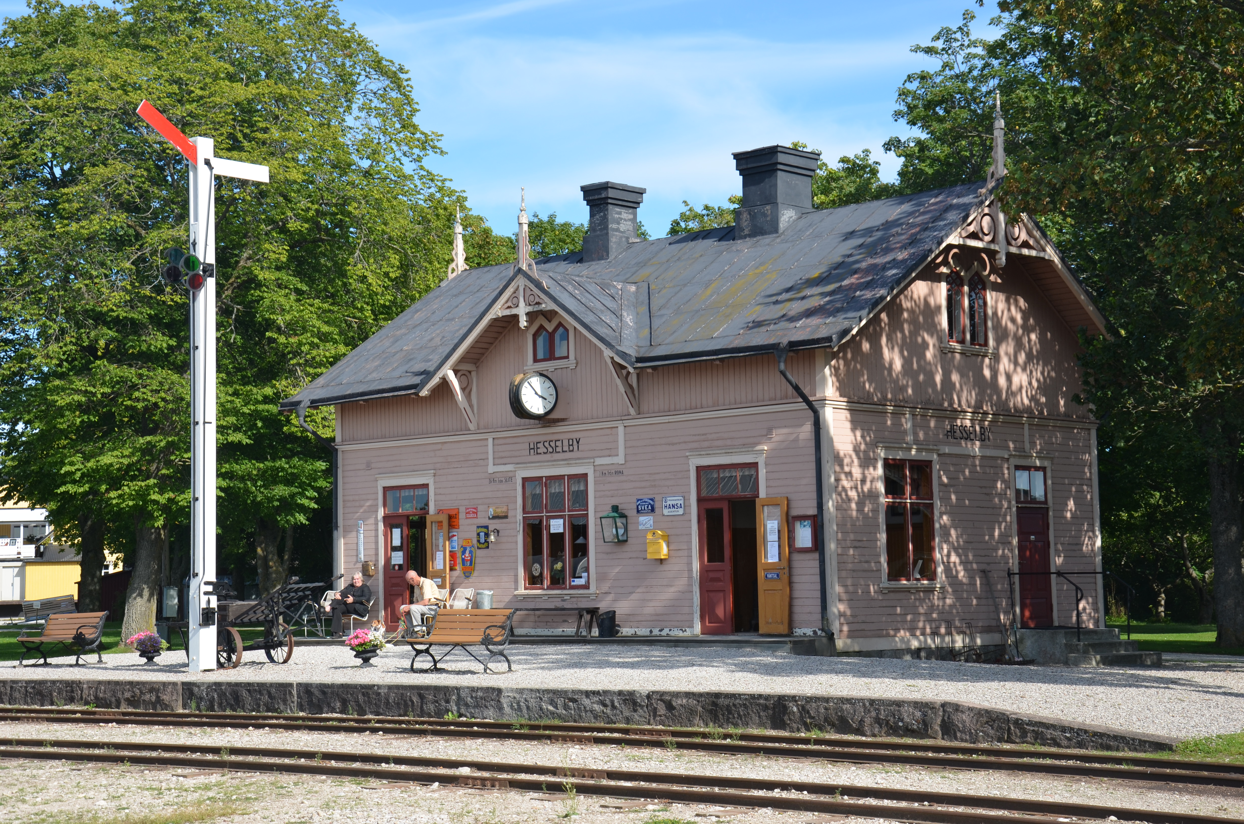 Hesselby järnvägsstation, Dalhem, Gotland